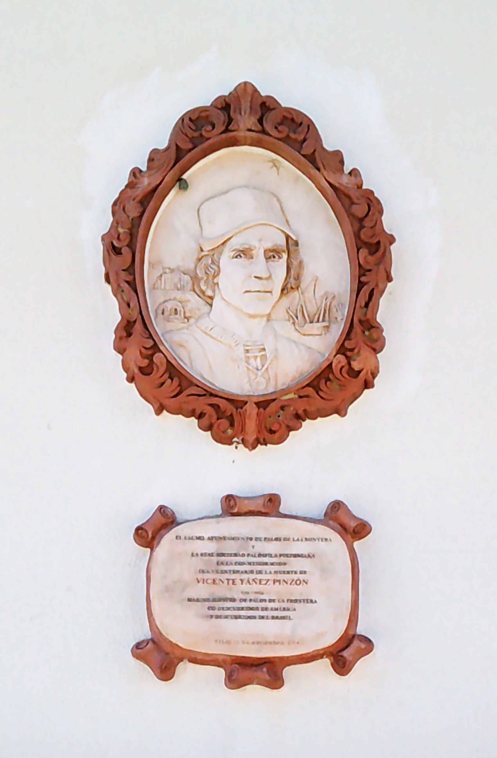 Vicente Yáñez Pinzón. Plaza de España. Palos de la Frontera, provincia de Huelva. Andalucía, España.